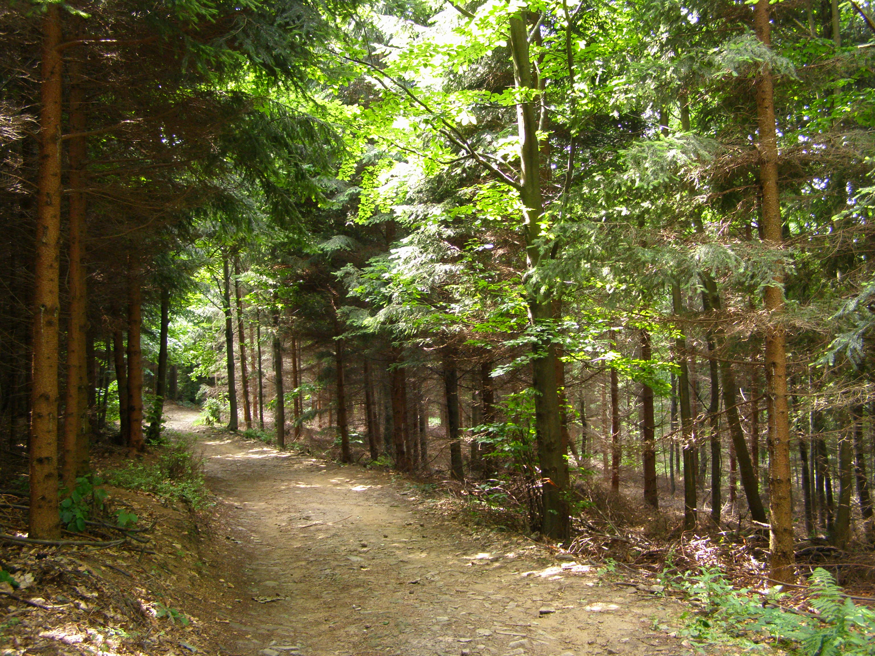 Palkovické hůrky, smíšený les pod vrcholem Kubánkov (661 m)